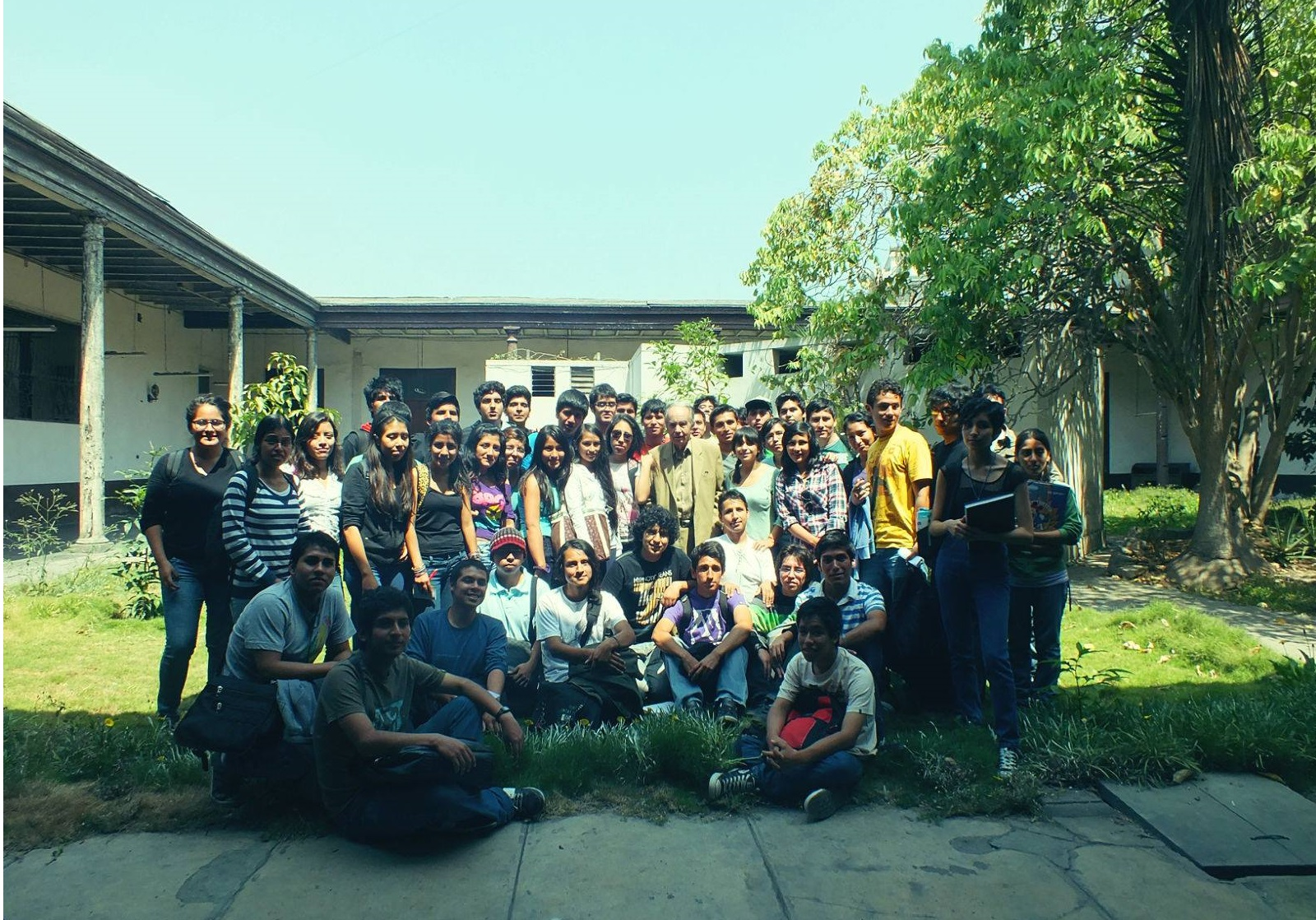 Pablo Macera a lado de alumnos de Historia de la UNMSM.